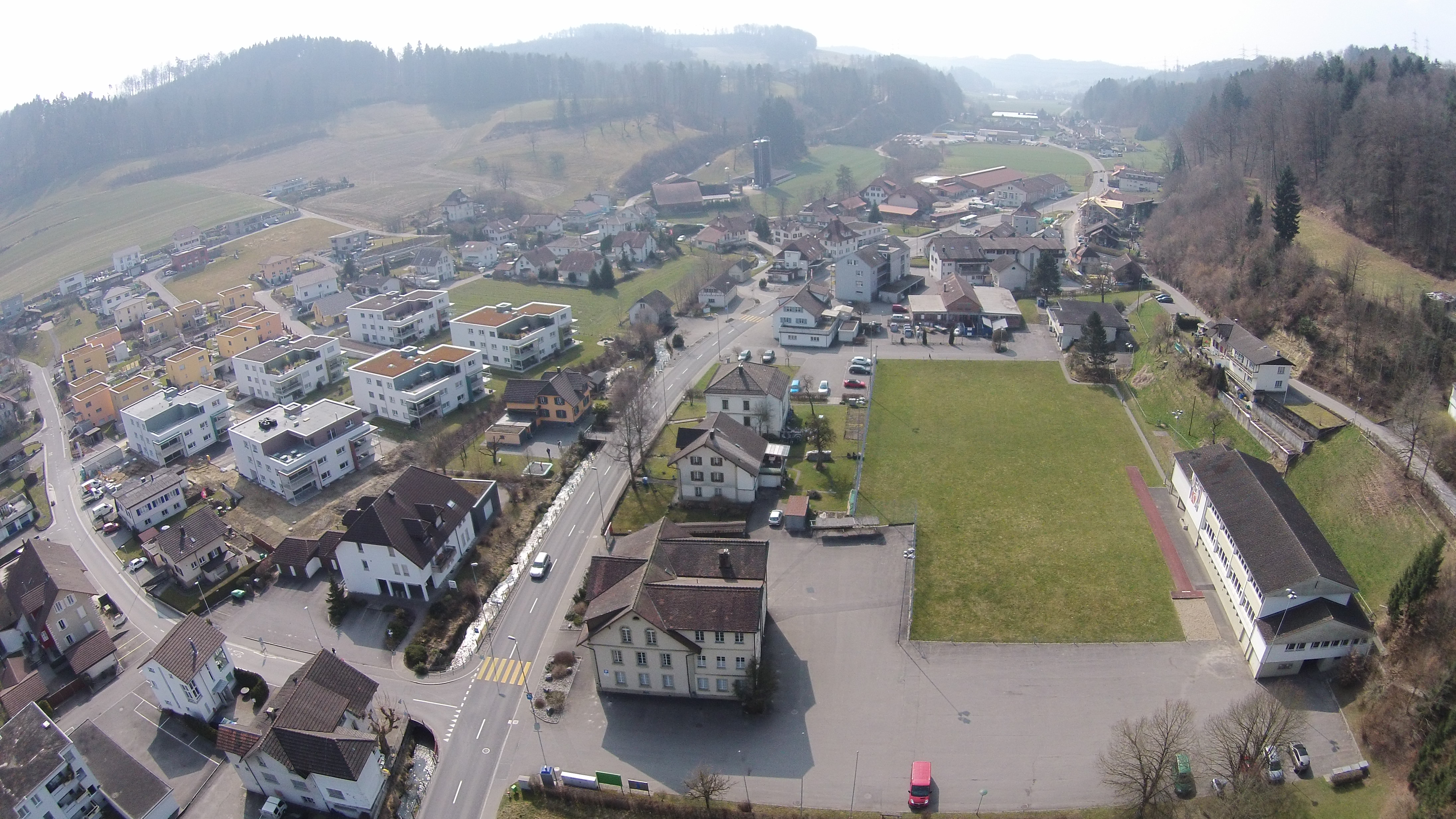 Uerkheim